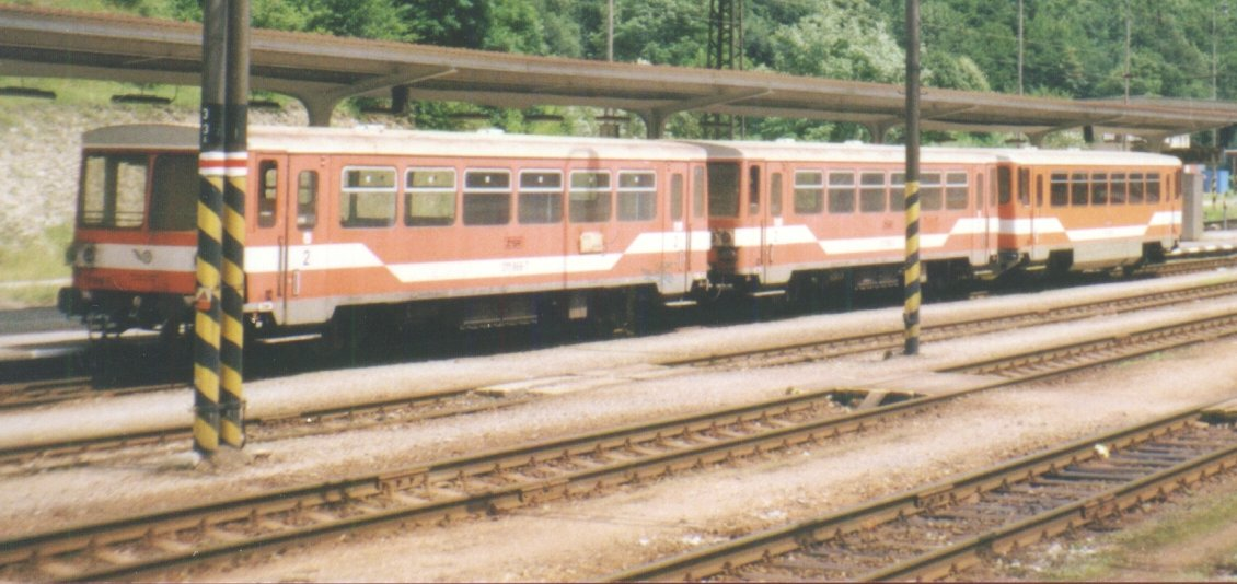 Tri apudurbaj dizelaj vagonoj, uzataj en branĉa linio de ĉefa linio Ĵilina - Koŝice, Slovakio, 2002. Mi, aŭtoro de la bildo, permesas al ĉiuj uzi ĝin kun ĉi tiuj kondiĉoj: La fonta bildo de ĉi tiu bildo estas ankaŭ en mia propra retpaĝaro [1]